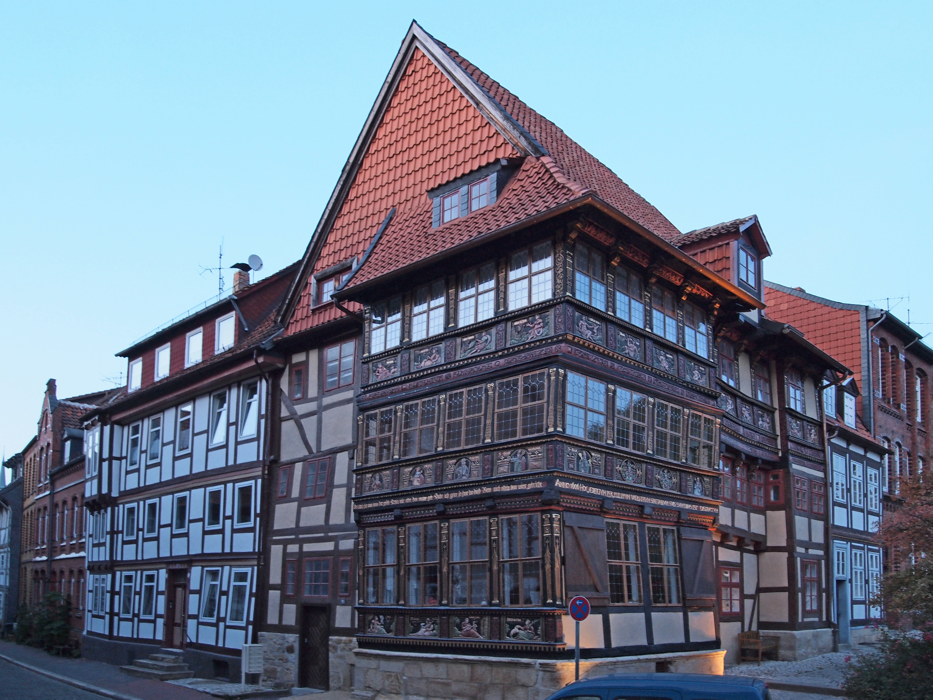 Wernersches Haus in der Straße „Hinterer Brühl“ Ecke „Godehardplatz“ in Hildesheim. Im Herbst 2011 war die erneute Renovierung abgeschlossen, die die helle Farbgestaltung von 1976 ersetzt hat. Die dunklen Farben entsprechen der ursprünglichen Farbgestaltung.